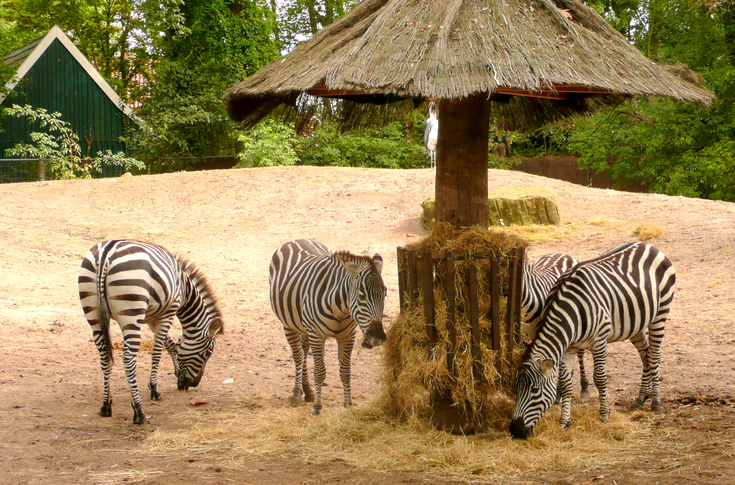 Zebras